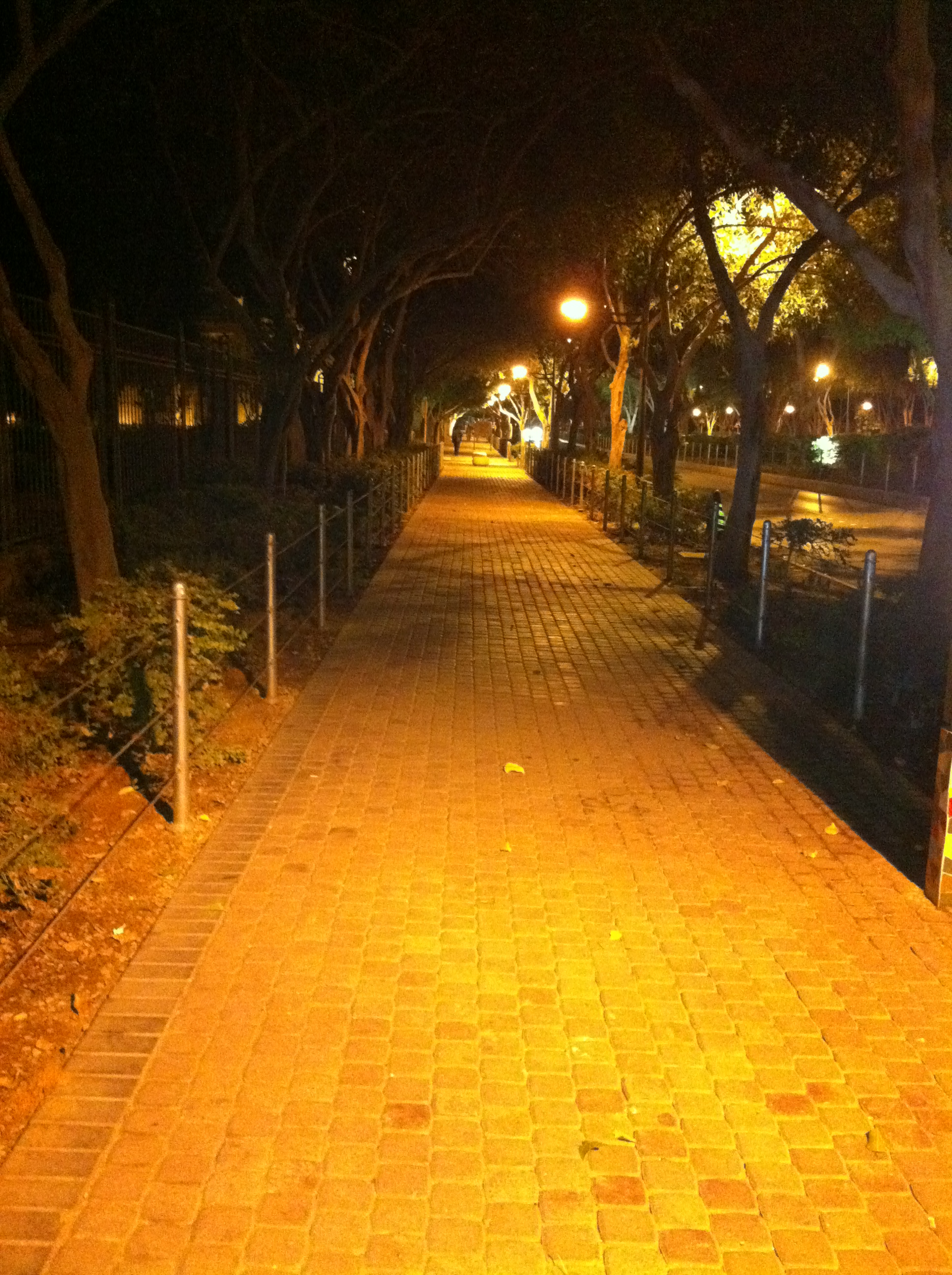 Al Murabba, Riyadh Saudi Arabia